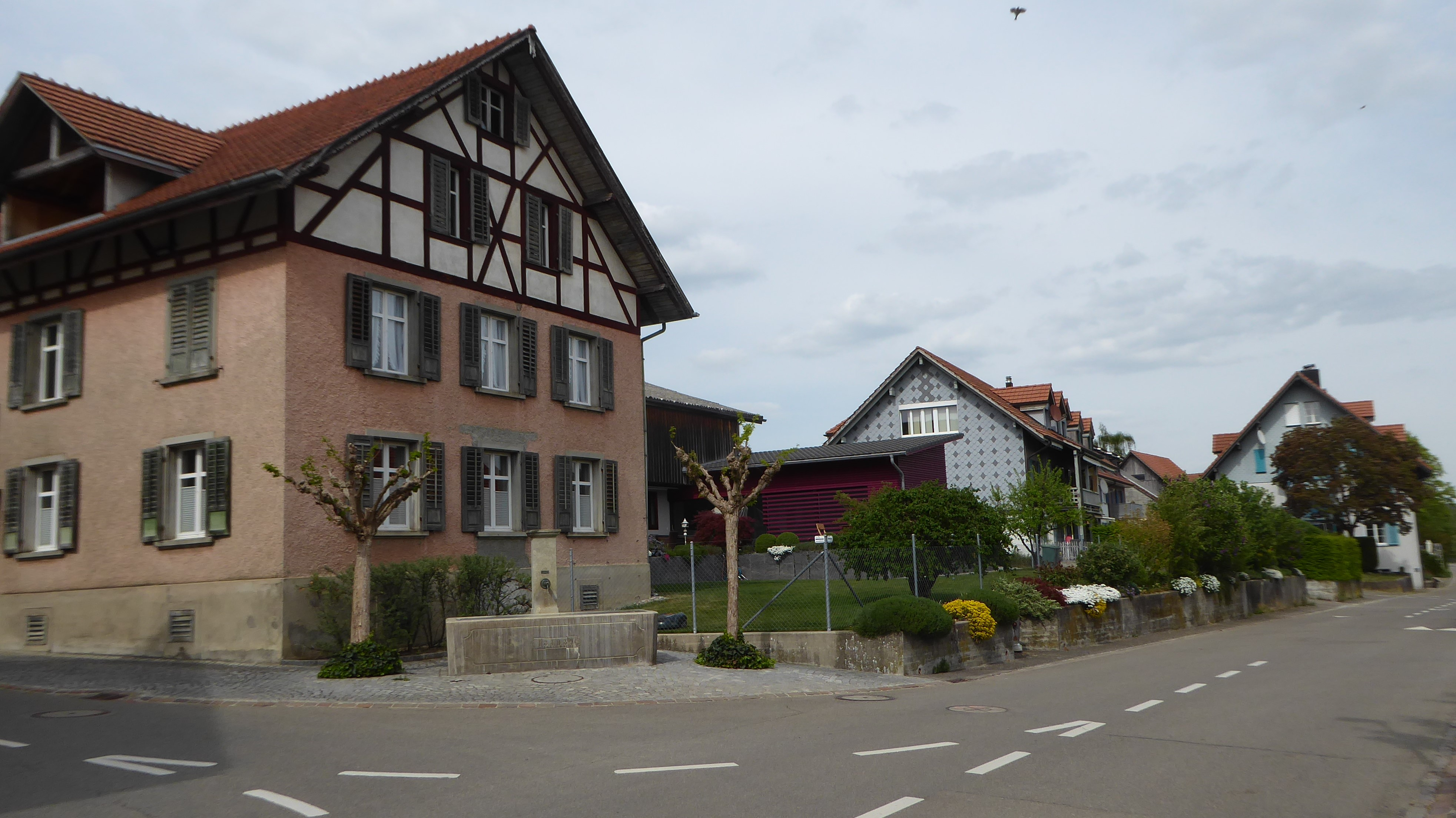 Dettighofen TG